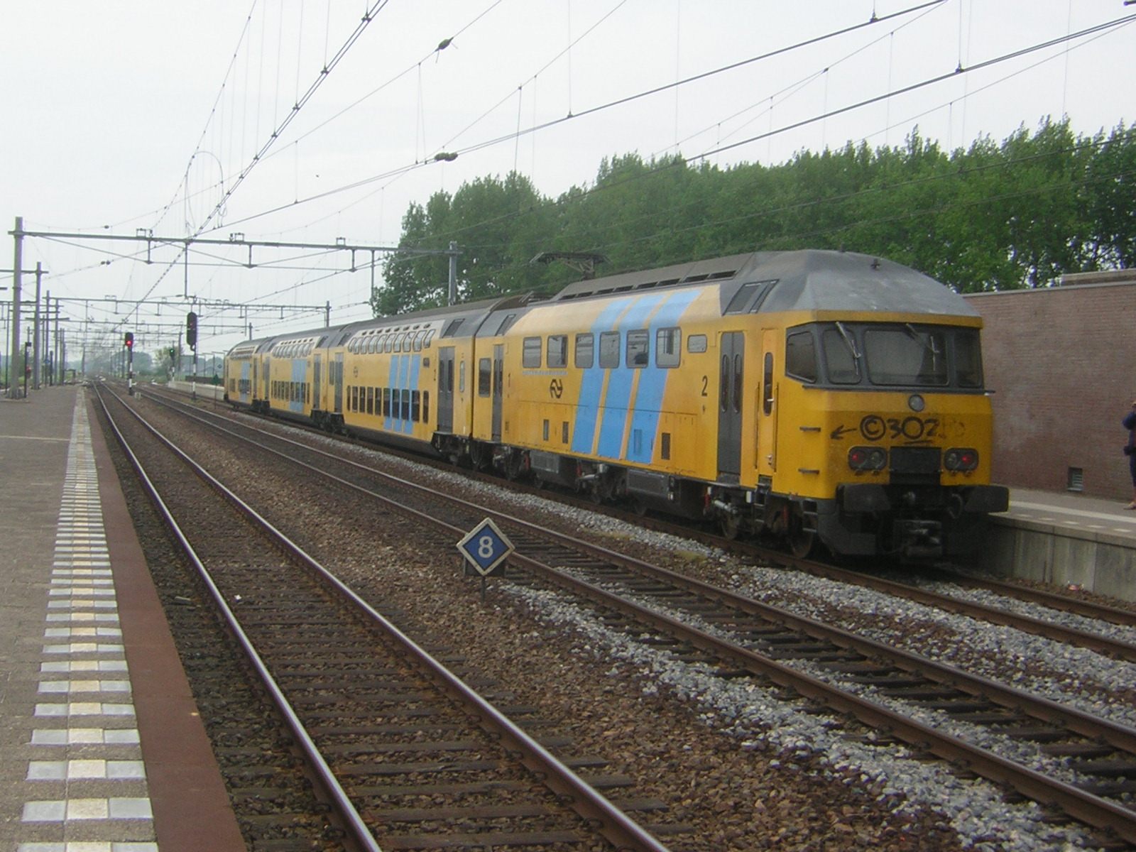 Een DD-AR met mDDM-motorbak halteert in Uitgeest om zijn weg verder te vervolgen naar Castricum, Heiloo en Alkmaar als 5800-Sneltrein.